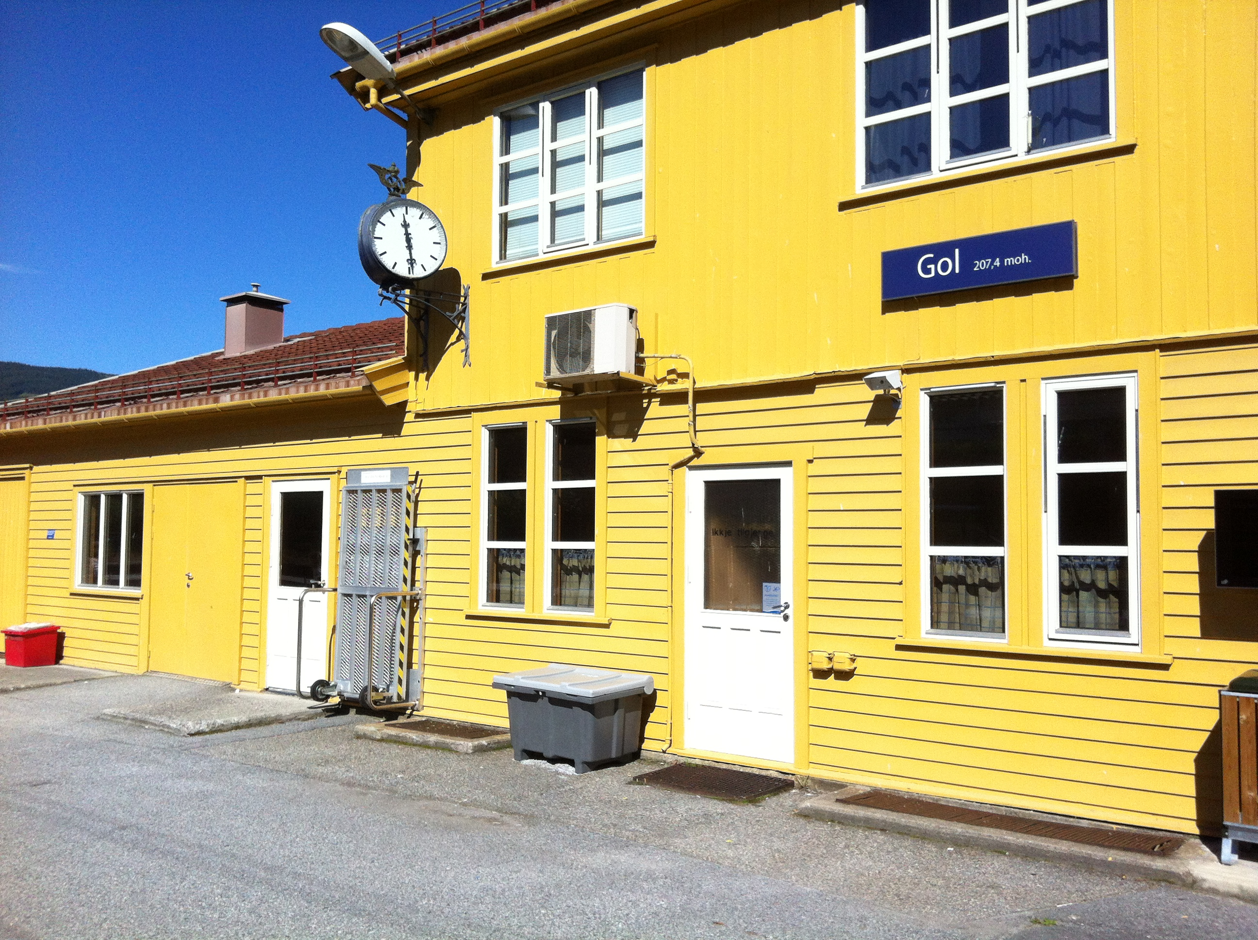 Stasjonsbygningen på Gol stasjon